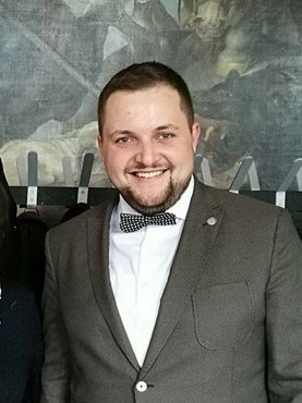 fotografie Davida Štolpy na zámku Slavkov